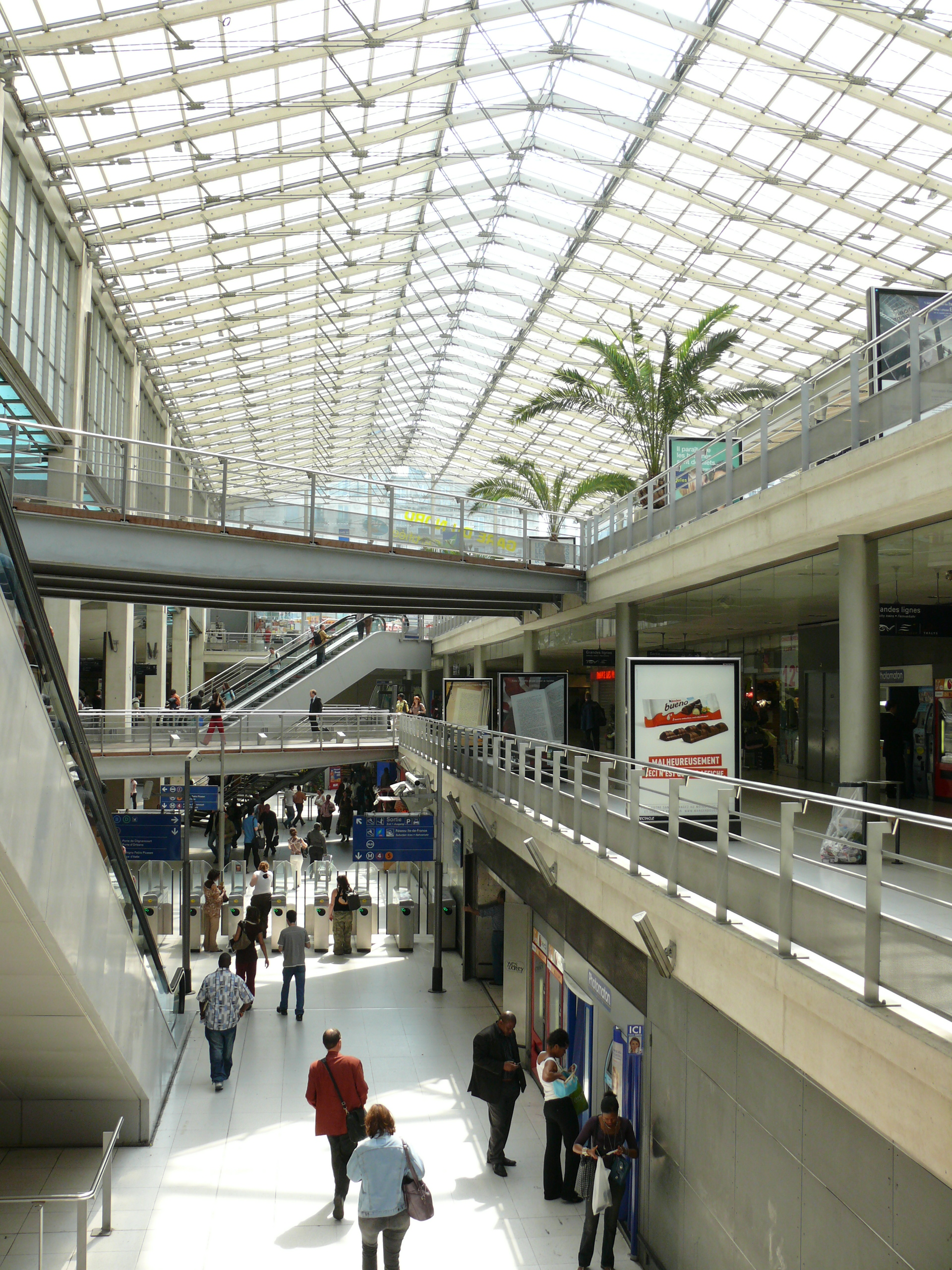 Gare du Nord (Paris) : le nouveau pôle d'échange banlieue